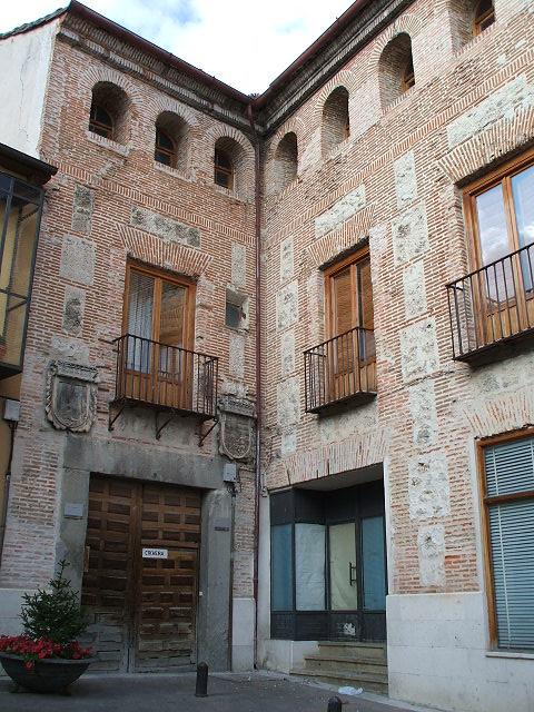 Palacio de los Marqueses de Santa Cruz (Cuéllar)